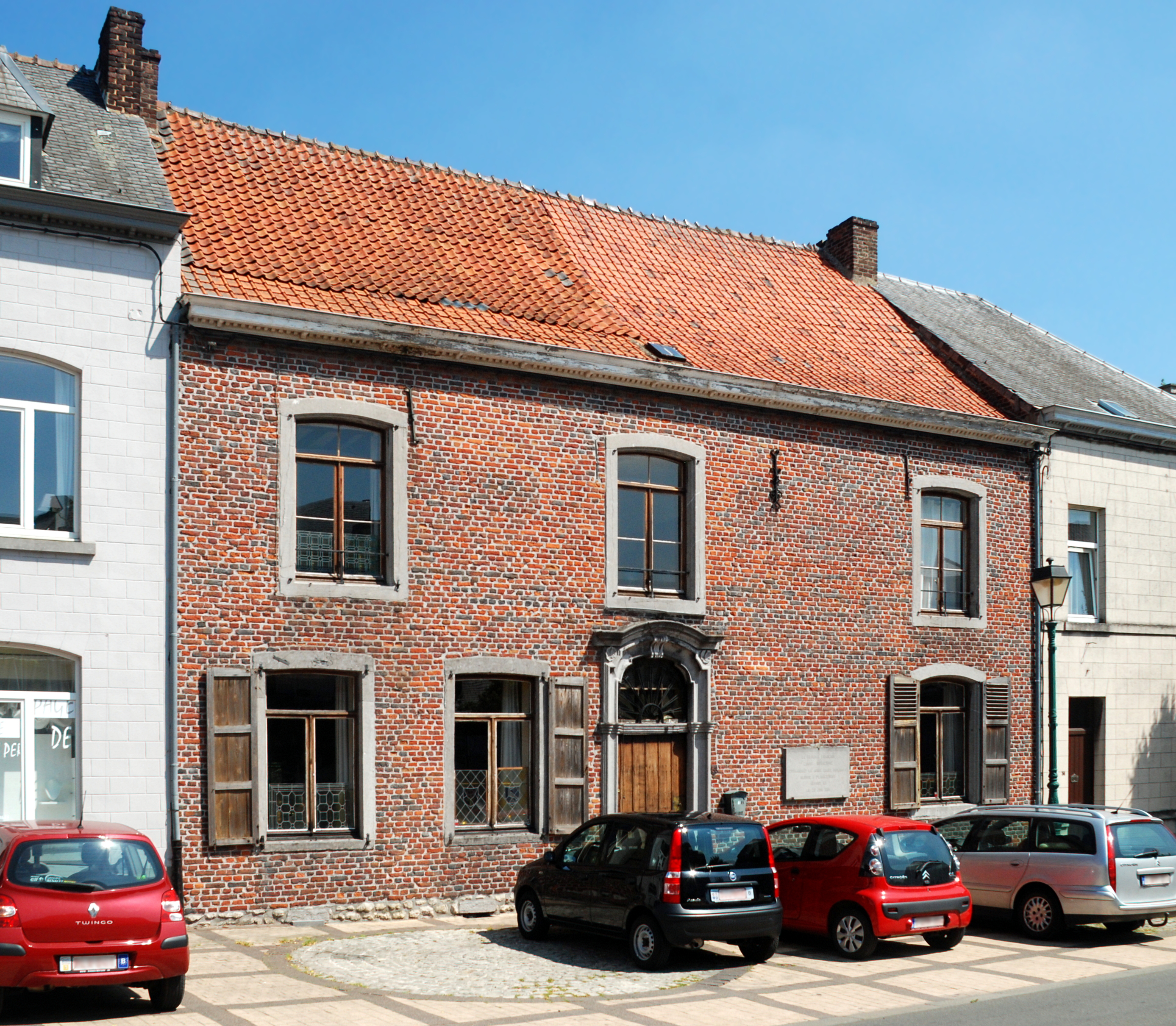 Belgique - Brabant wallon - Genappe - Auberge du Roy d'Espagne